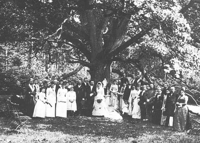 Hochzeitsgesellschaft under der Bräutigamseiche